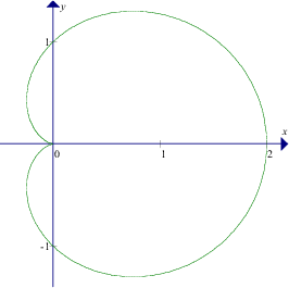 心脏线 (--Created by myself--)